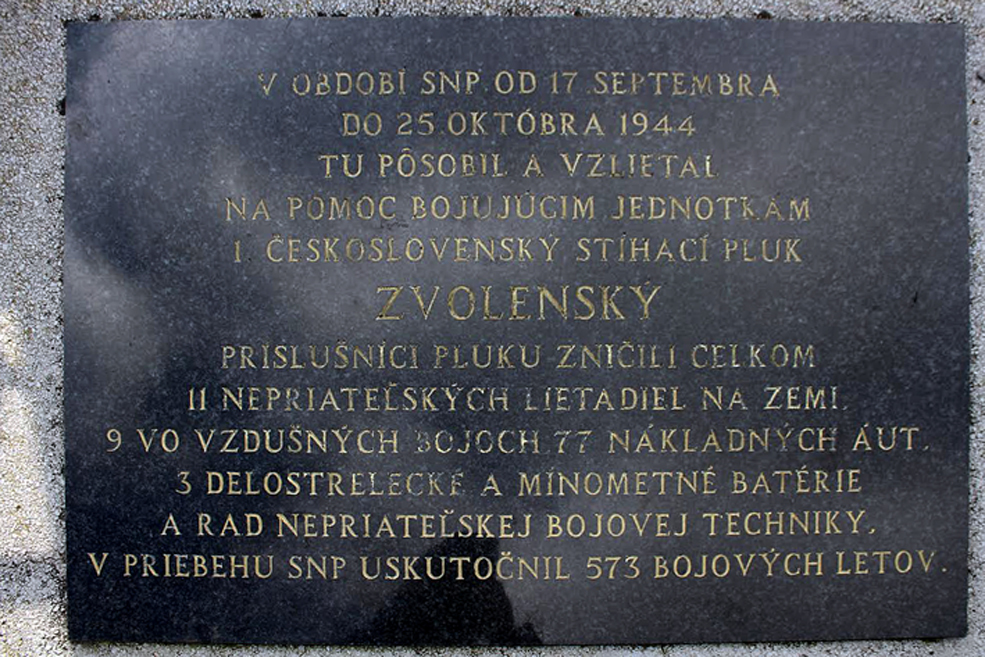 Pamätná tabuľa v obci Zolná